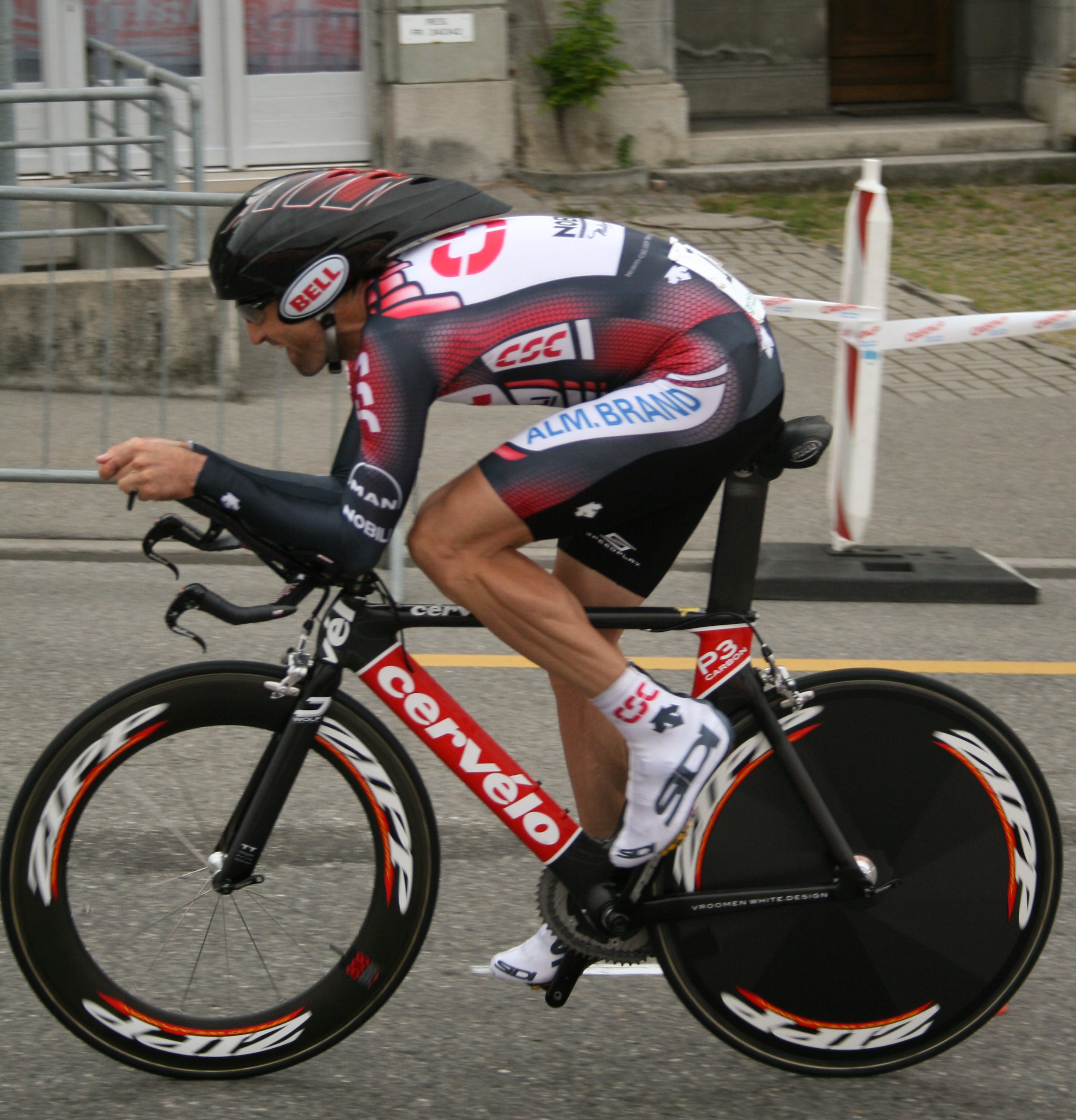 Bobby Julich prologue du Tour de Romandie 2007.